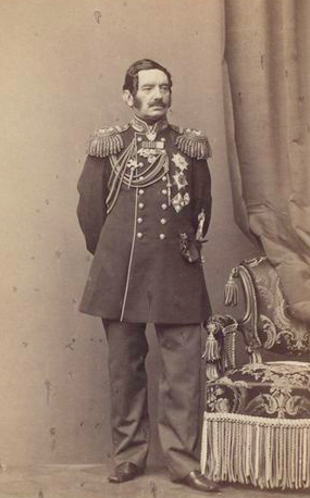 Безак, Александр Павлович